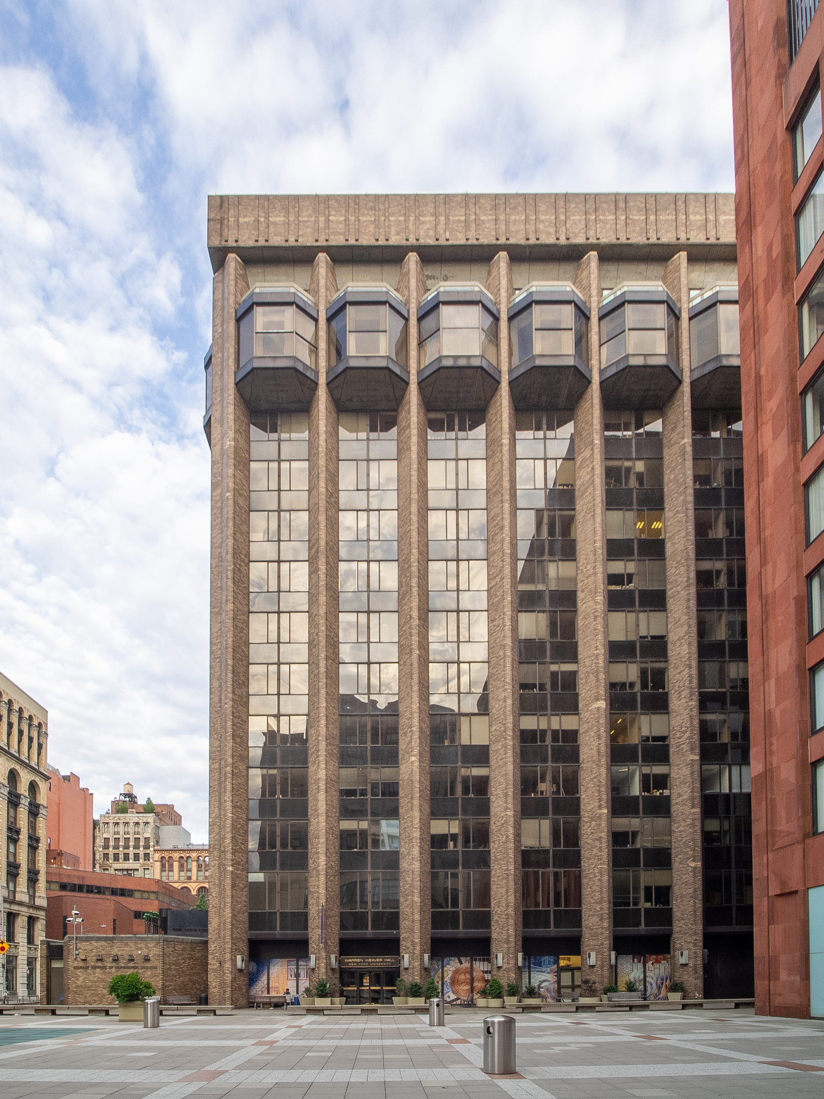 NYU, Greenwich Village, NYC